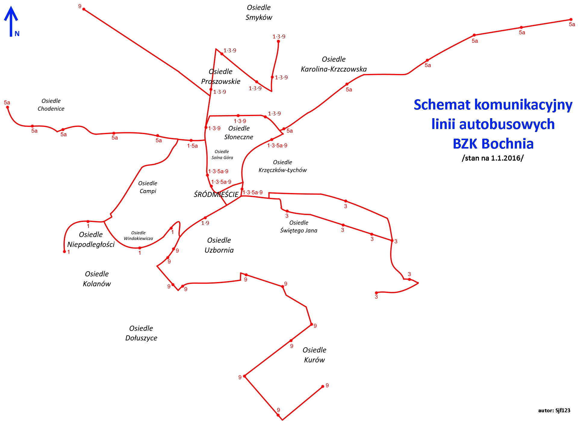 Grafika przedstawia poglądowo shchemat komunikacyjny BZK Bochnia na dzień 01.01.2016